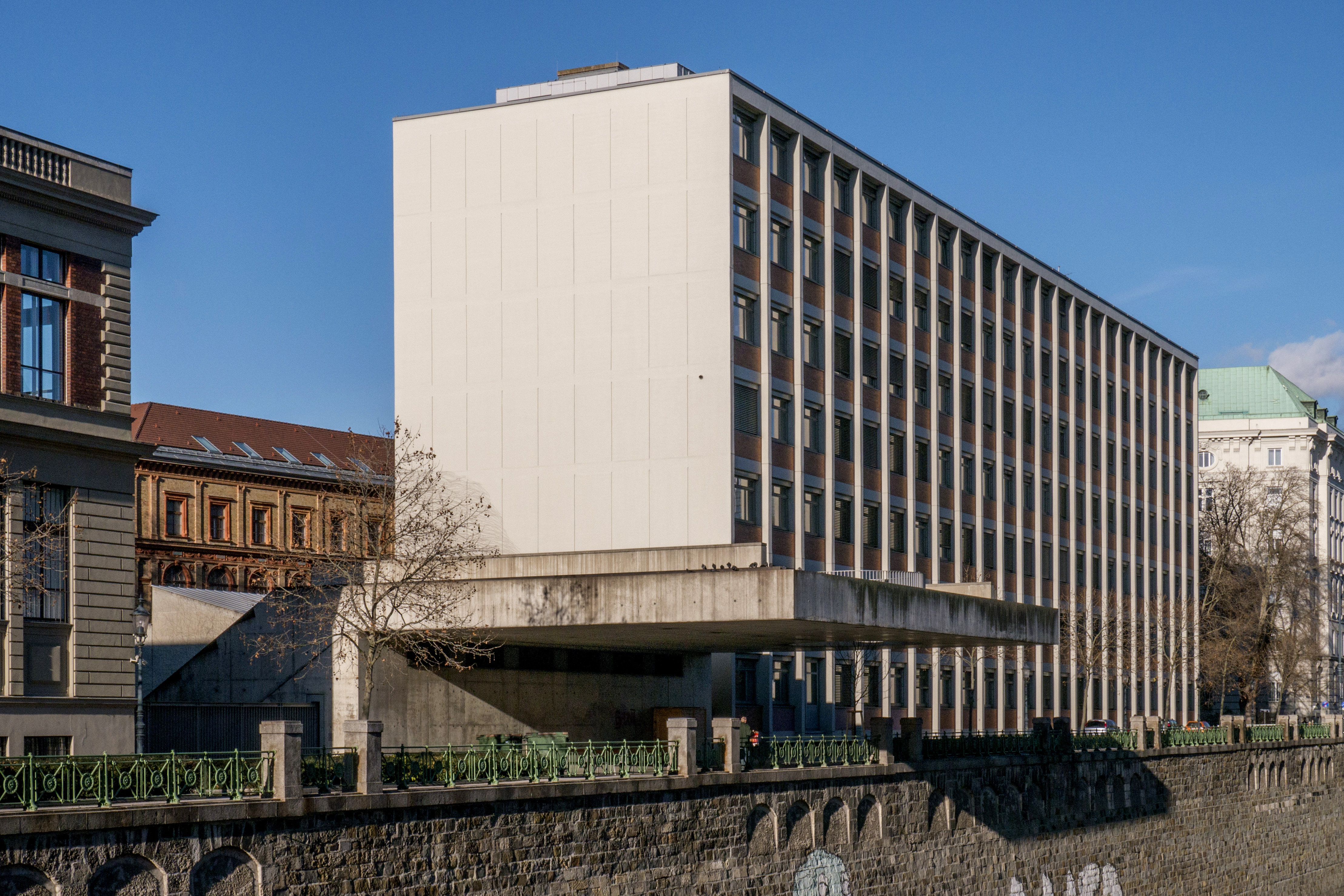 Universität für angewandte Kunst Wiental